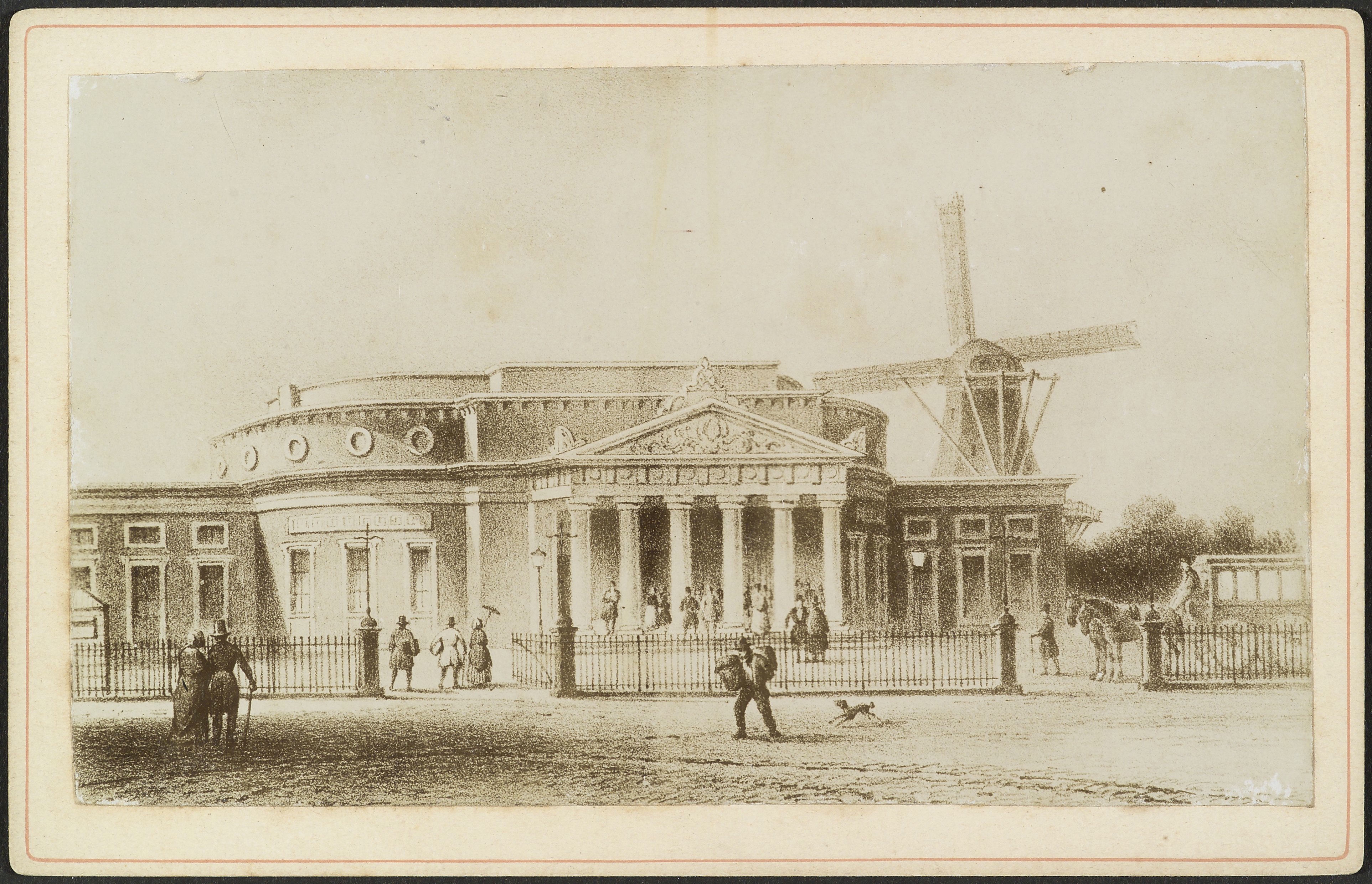 Station Amsterdam Willemspoort (bij de Haarlemmerpoort). Beginpunt van de spoorlijn naar Haarlem tussen 1842 en 1878. Het station is gesloopt in 1878 en vervangen door het Centraal Station. / Het Fortuin: Station en stenen stellingmolen (opmerking: Kabinetfoto)